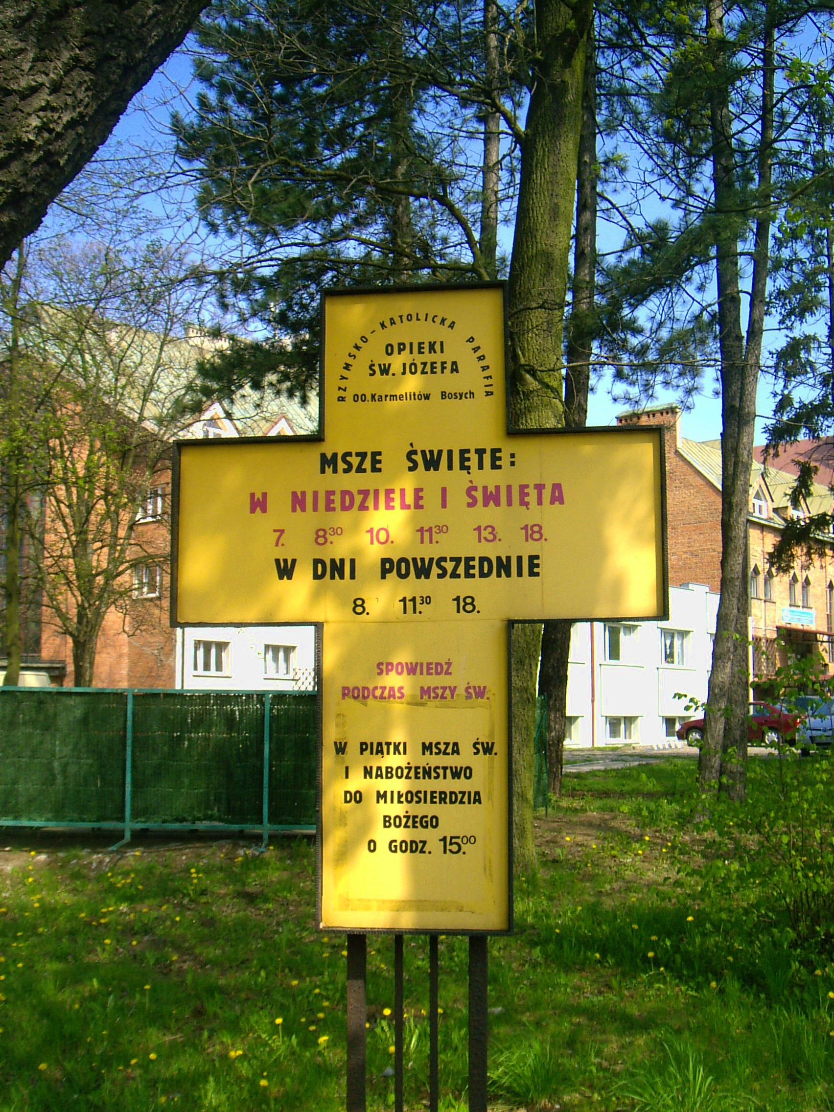 Tablica z rozkładem Mszy Św. w Parafii Opieki Świętego Józefa i Matki Boskiej z Góry Karmel w Łodzi